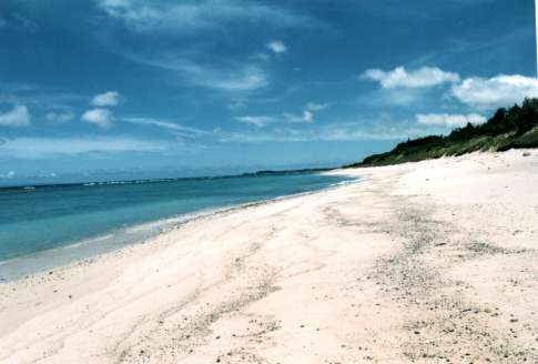 Beach in Yo, Kasari, Amami City, Kagoshima.